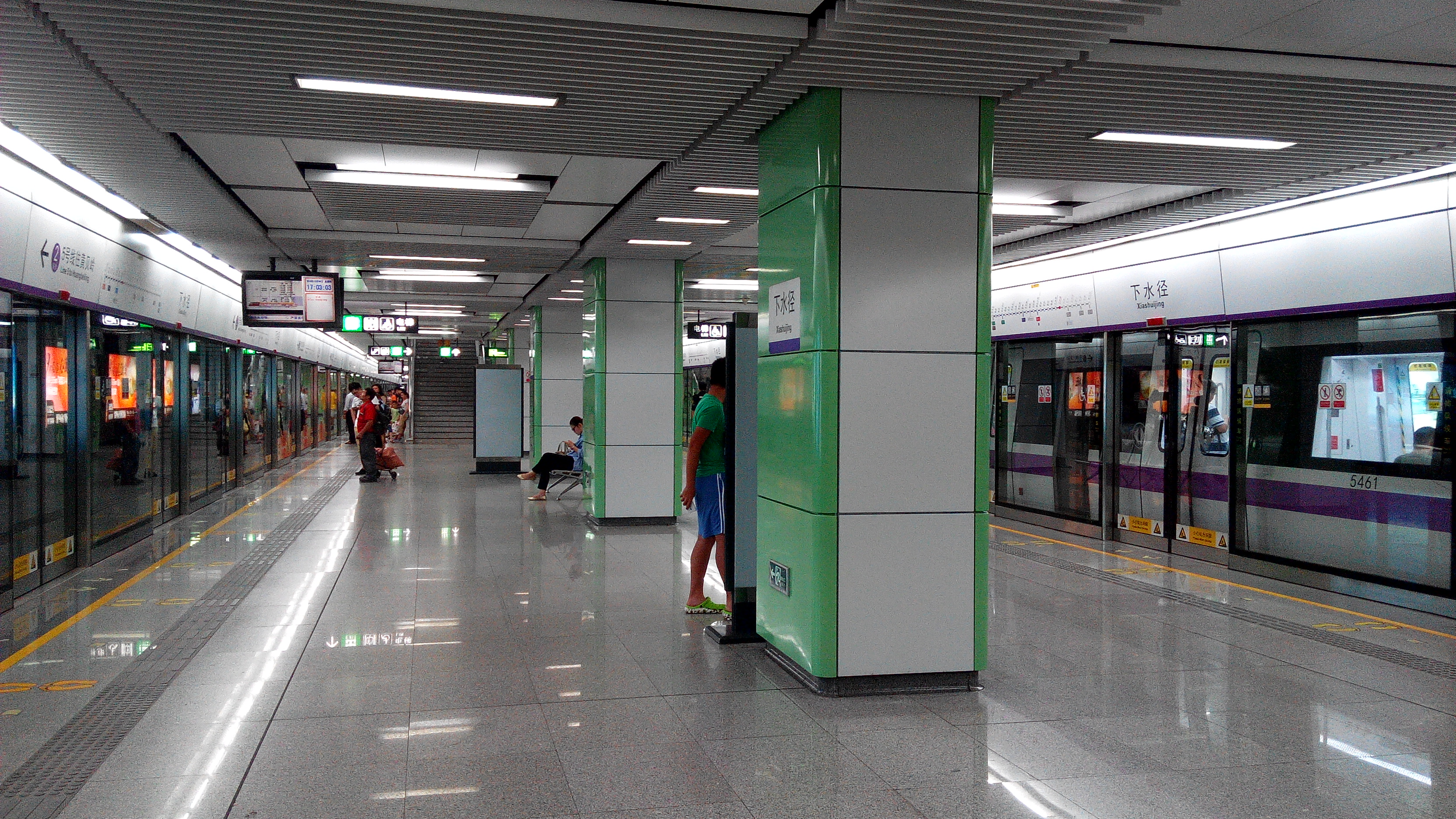 深圳地铁5号线下水径站站台